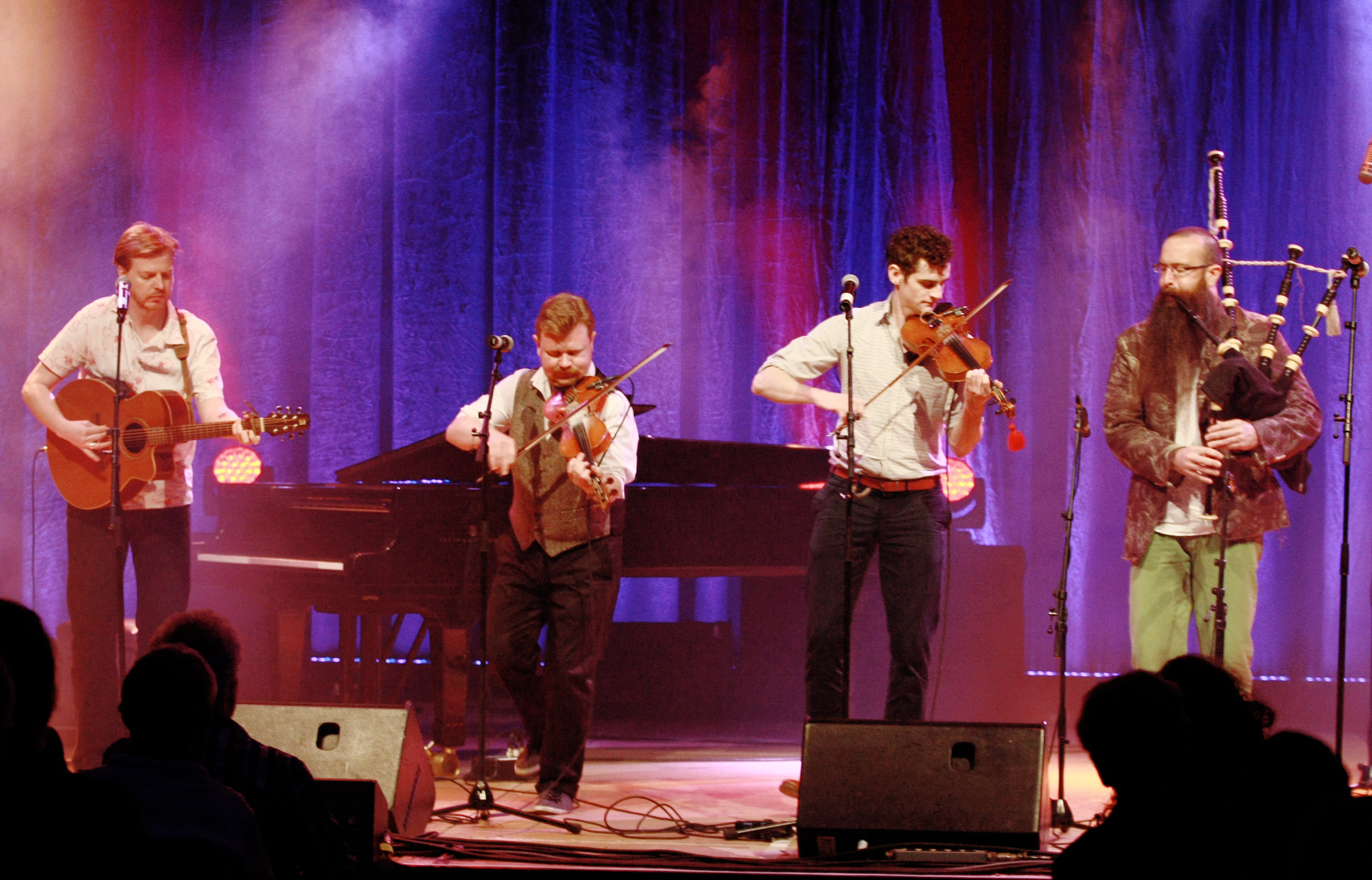 Die Battlefield Band, Folkband aus Schottland Hier während eines Aufritts am 25.01.2012 auf der Freiburger Kulturbörse (Music Hall)